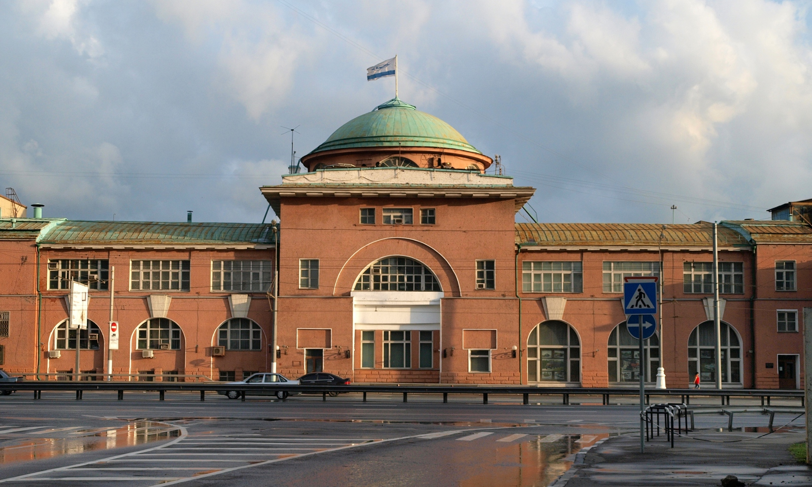 Москва, Автозаводская улица, дом 23, корпус 5. Здание Музея истории автомобилестроения при Заводе имени Лихачёва.